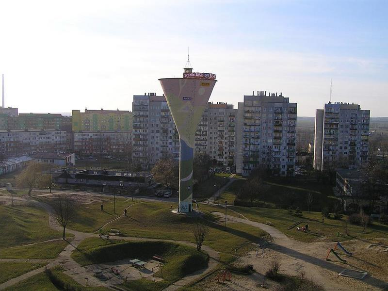 Miejsce wykonania - Lubin